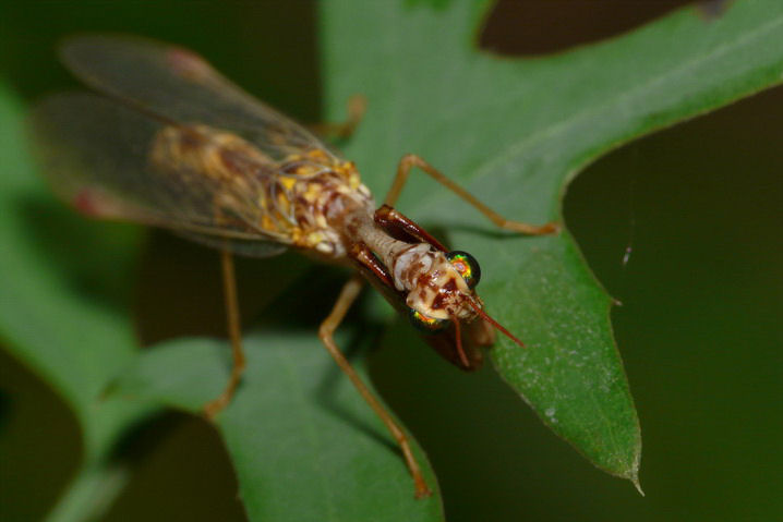 Mantispe